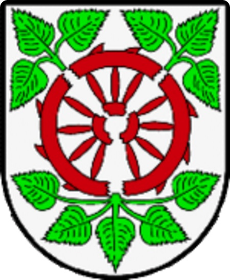 Wappen der ehemaligen Gemeinde Wielfresen, Steiermark